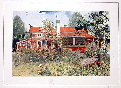 Stugan